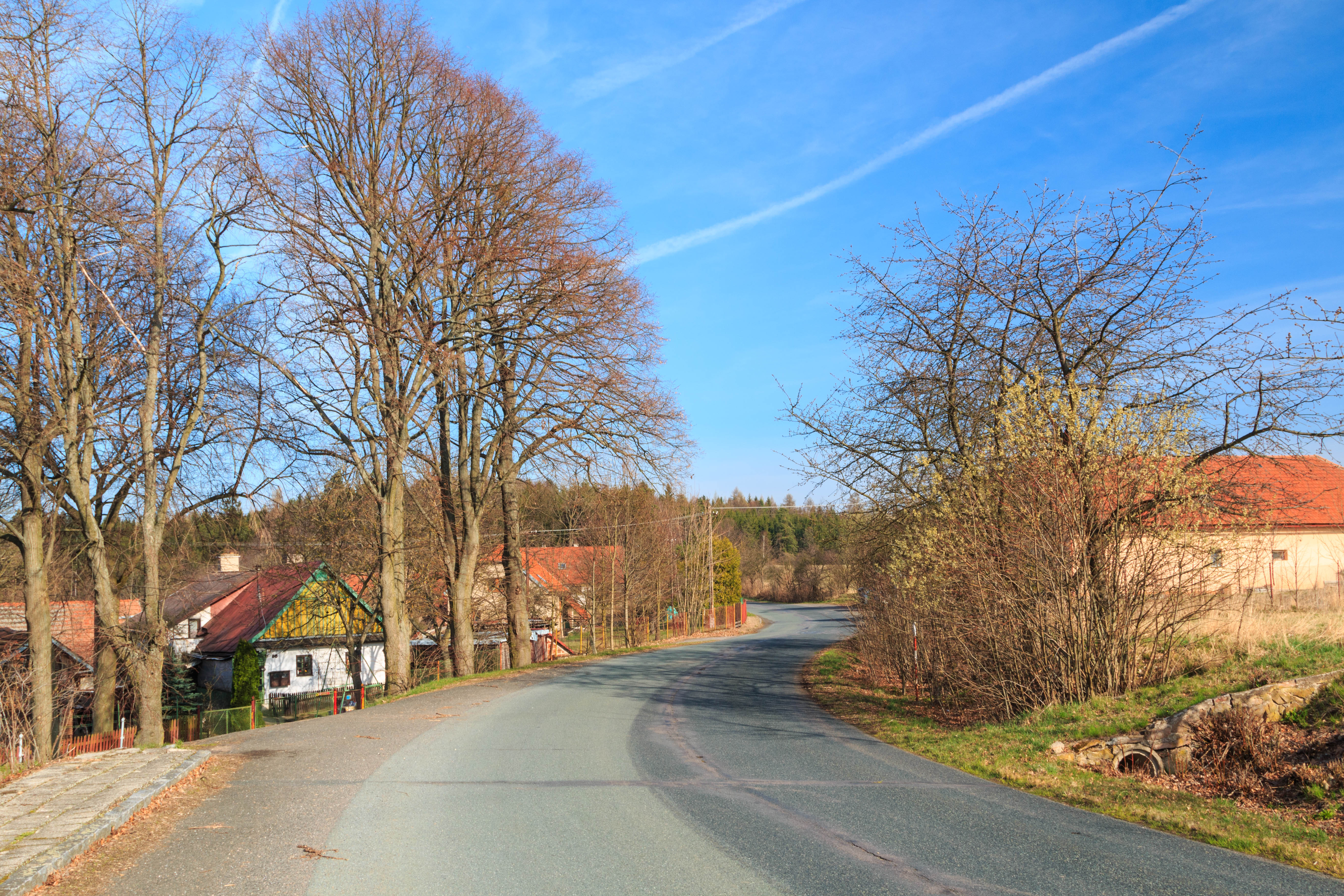 Leškova hůrka - dům čp. 86